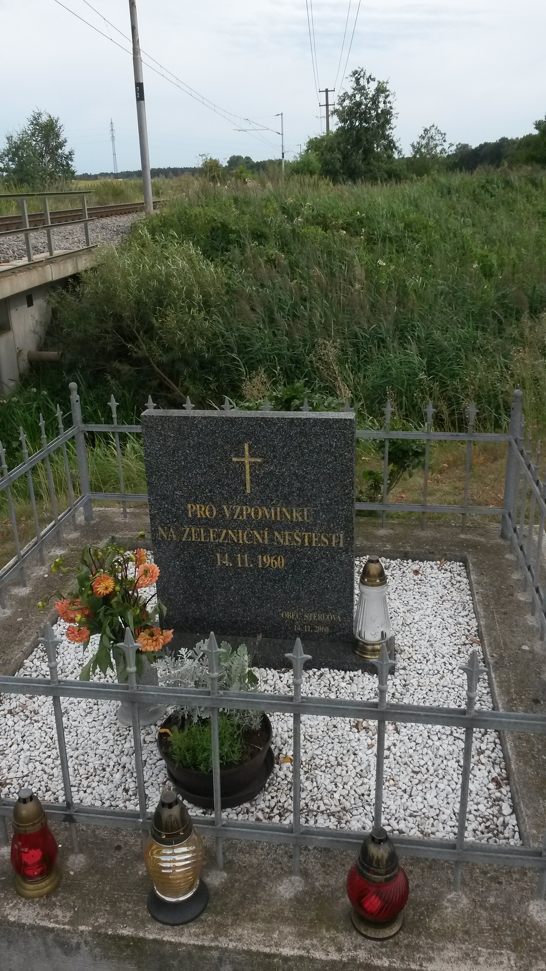 Památník železniční nehody u Stéblové, v pozadí trať směr Pardubice